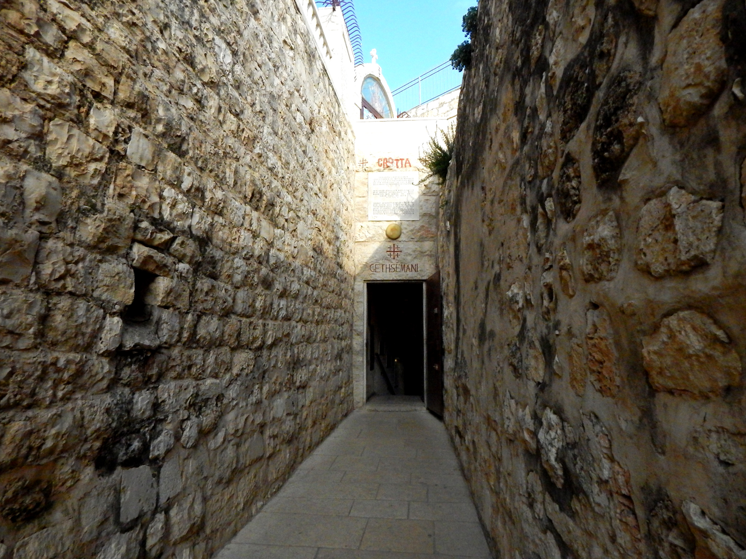 Jerozolima, Grota Pojmania Jezusa, Grota Getsemani